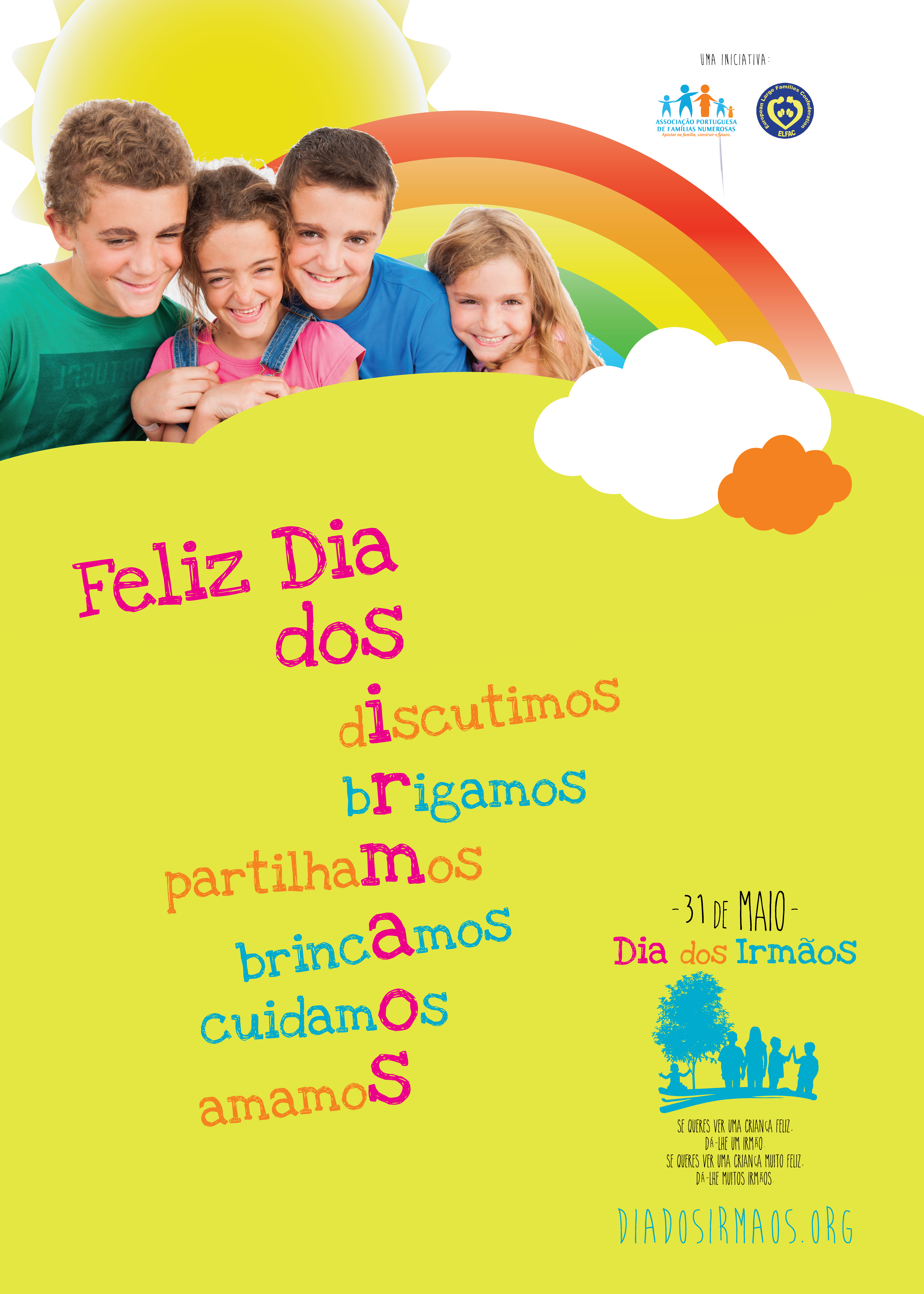 Cartaz de divulgação do Dia dos Irmãos, dirigido a chamar a atenção para o 31 de maio de 2017